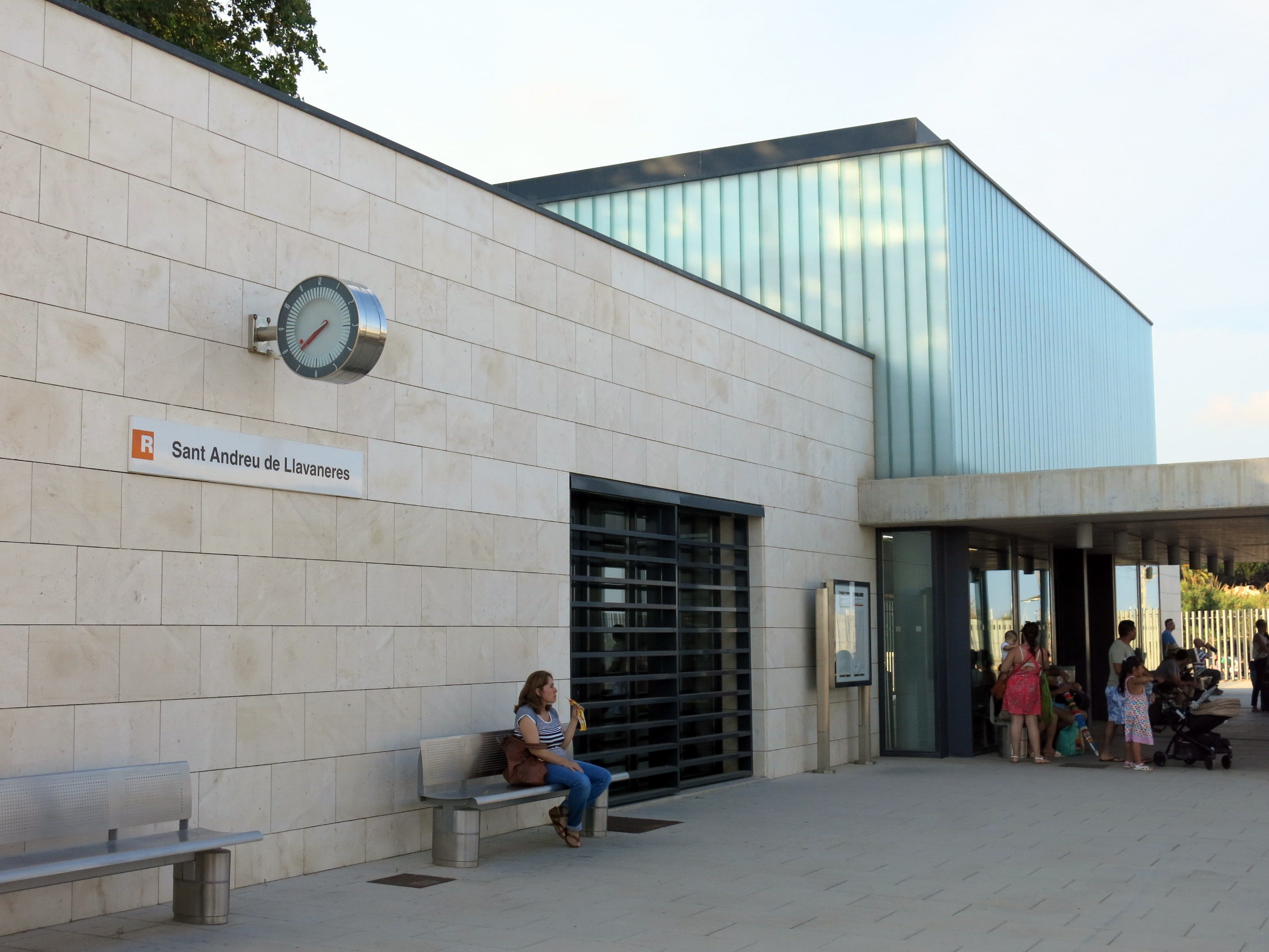 Estació de ferrocarril de Sant Andreu de Llavaneres